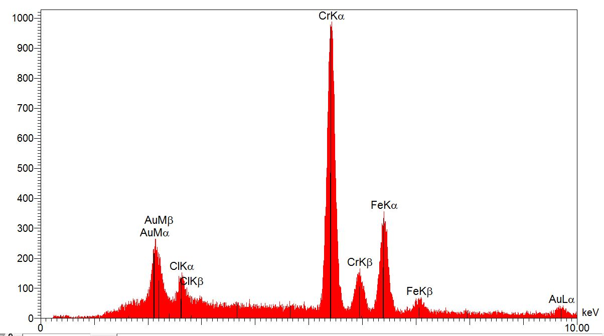 Braun Series 9 EDX Spektrum Schermesser Chrom Schicht in R.E.M Mikroskop